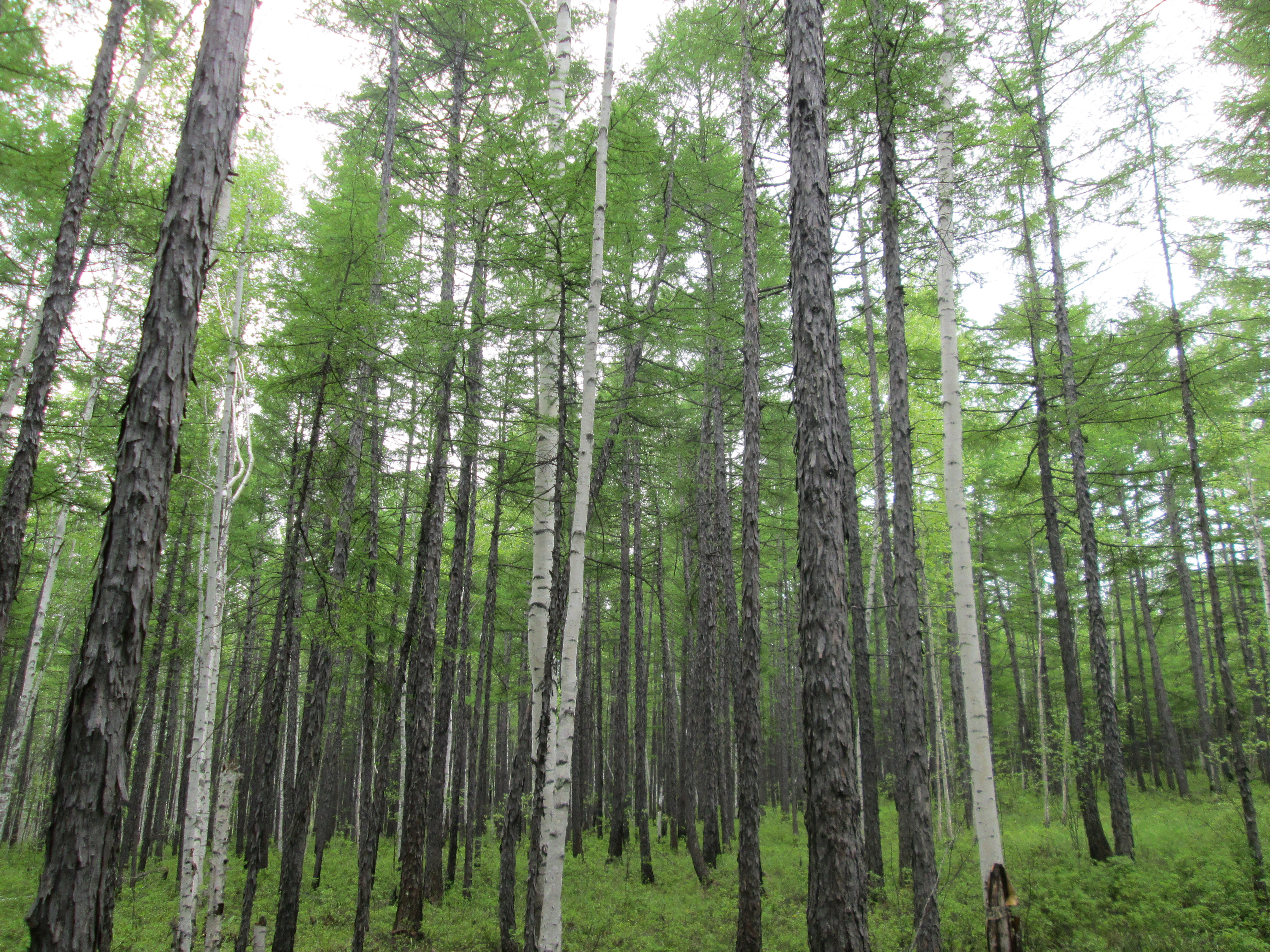 Лиственница амурская. Недалеко от села Гайтер.